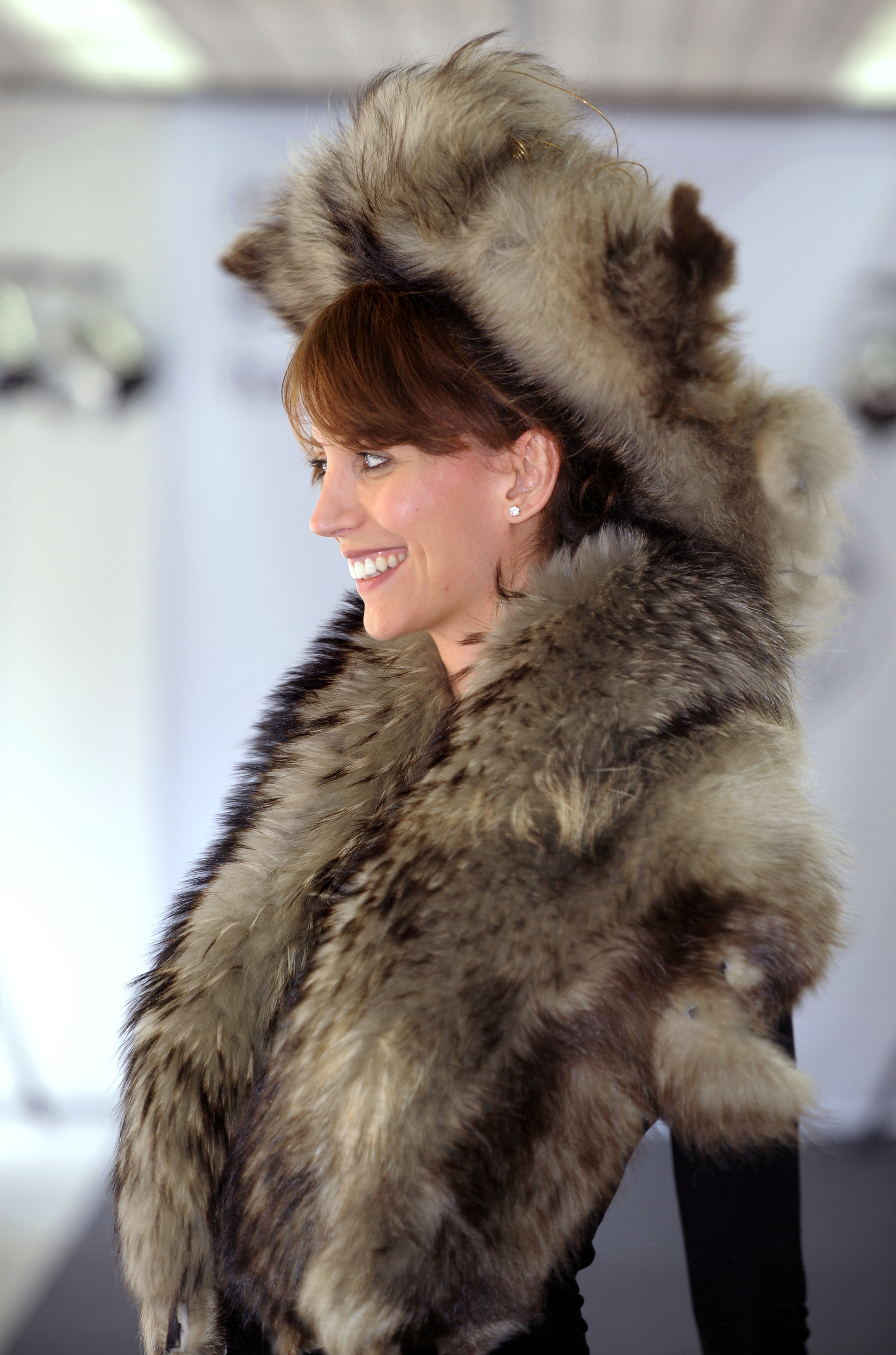 International German Fur Award 2009 des Kürschnerhandwerks. Wettbewerb der Auszubildenden.